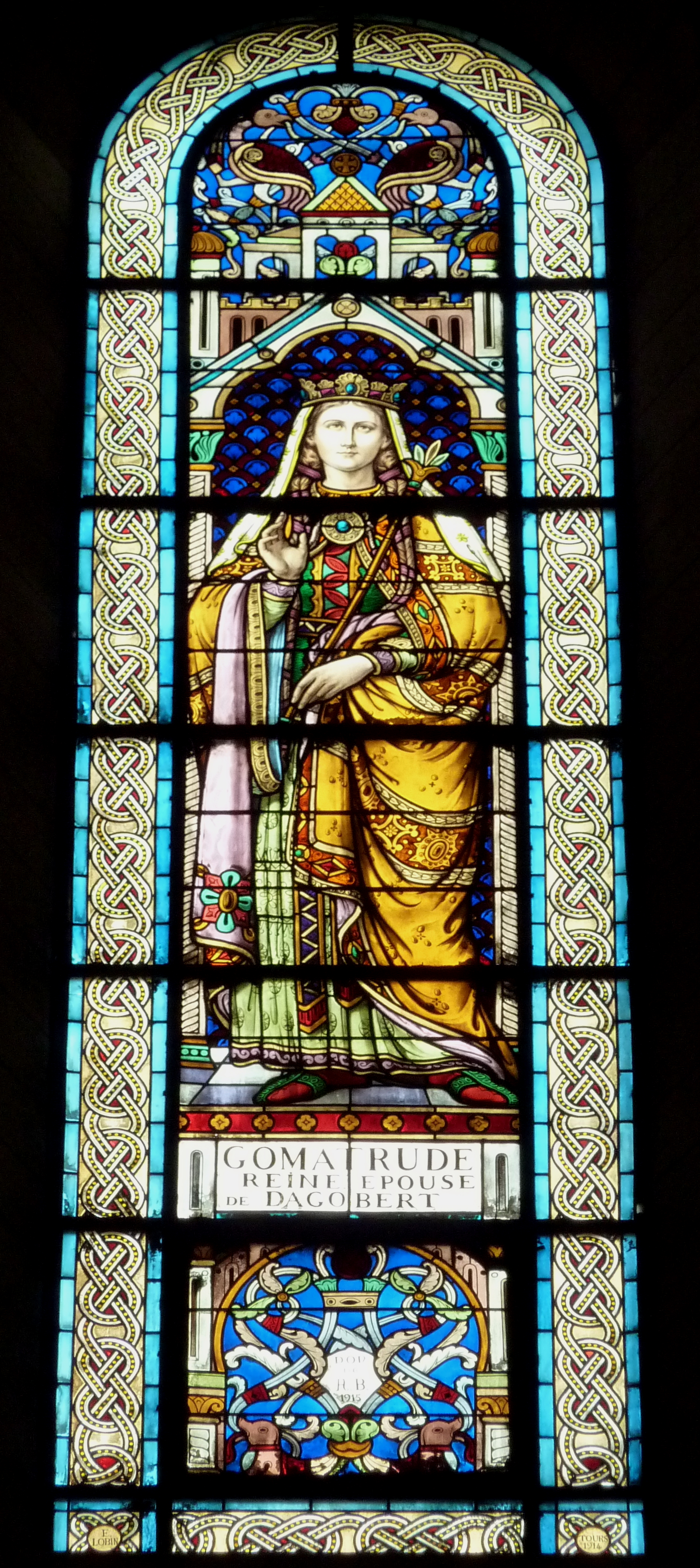 Bleiglasfenster in der katholischen Pfarrkirche Saint-Vincent-de-Paul in Clichy, Darstellung: Gomatrude, Signatur: "F. LORIN TOURS 1914"